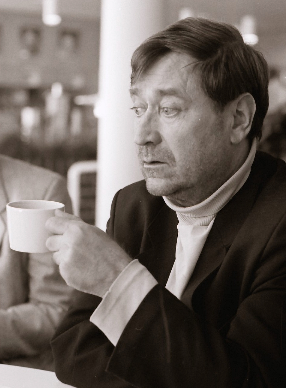 Hannu Salama Kuusankosken teatterin Juhannustanssit-ensi-illassa 1988